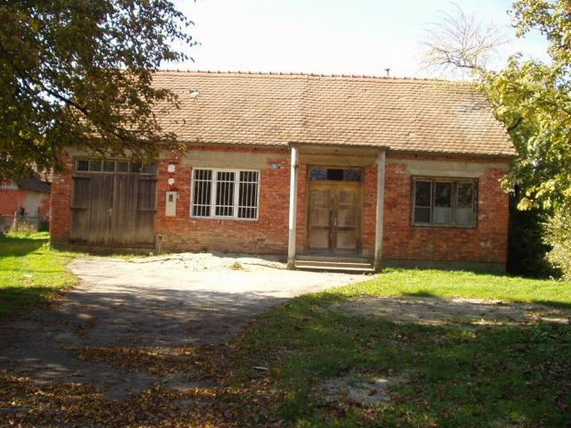 Potočec - Dom Kulture